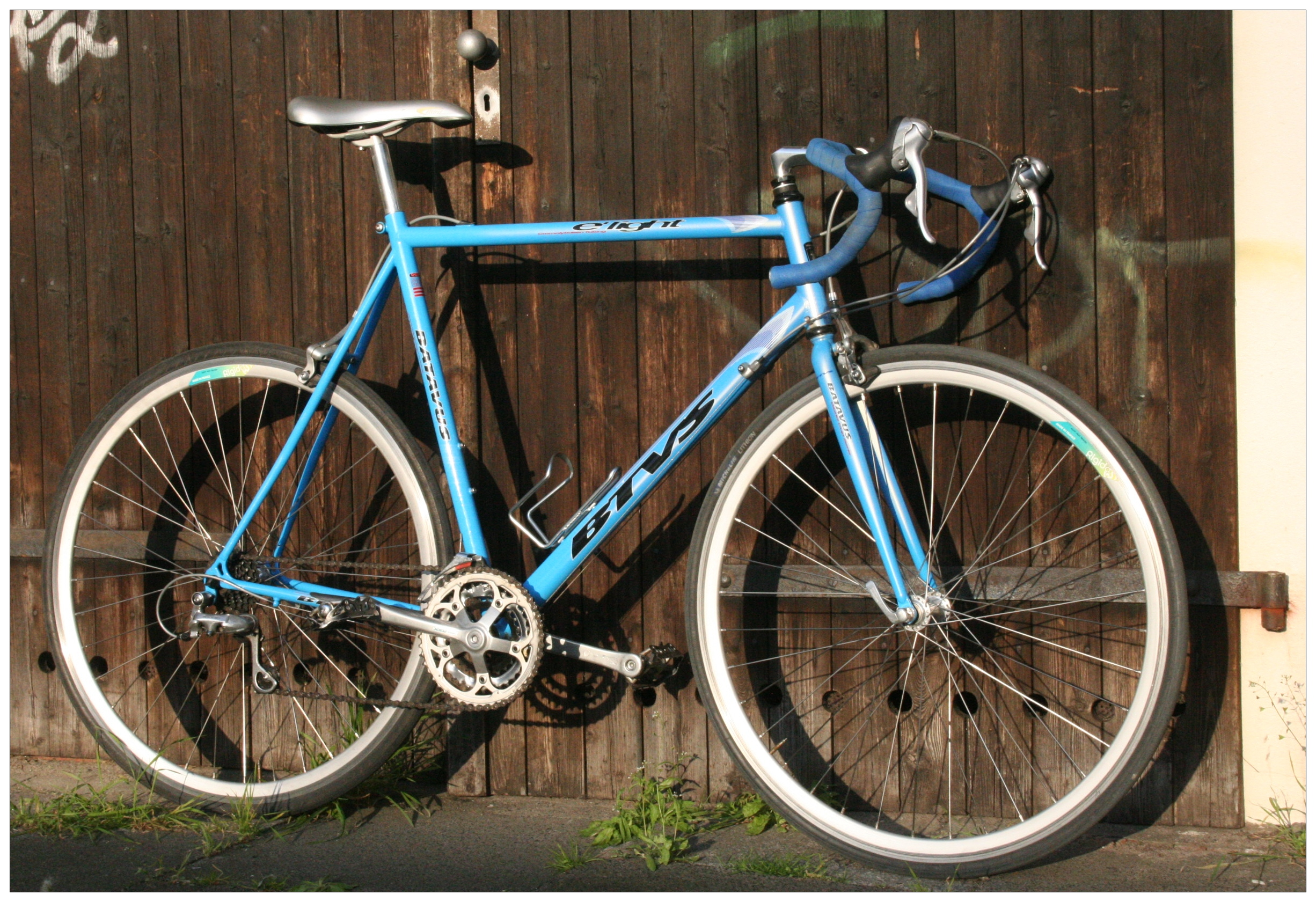 Batavus Roadbike based on a CroMo steel frame (build in 90th)